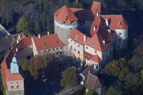 Stadtschlaining, Austria, aerialphotography